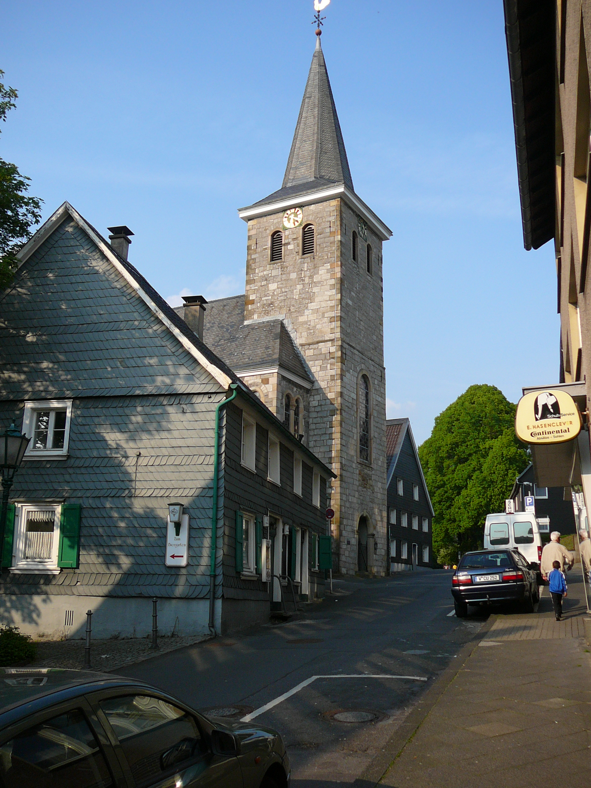 Odoakerstraße, Wuppertal